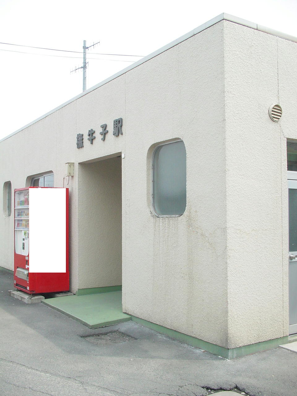 （撫牛子駅）